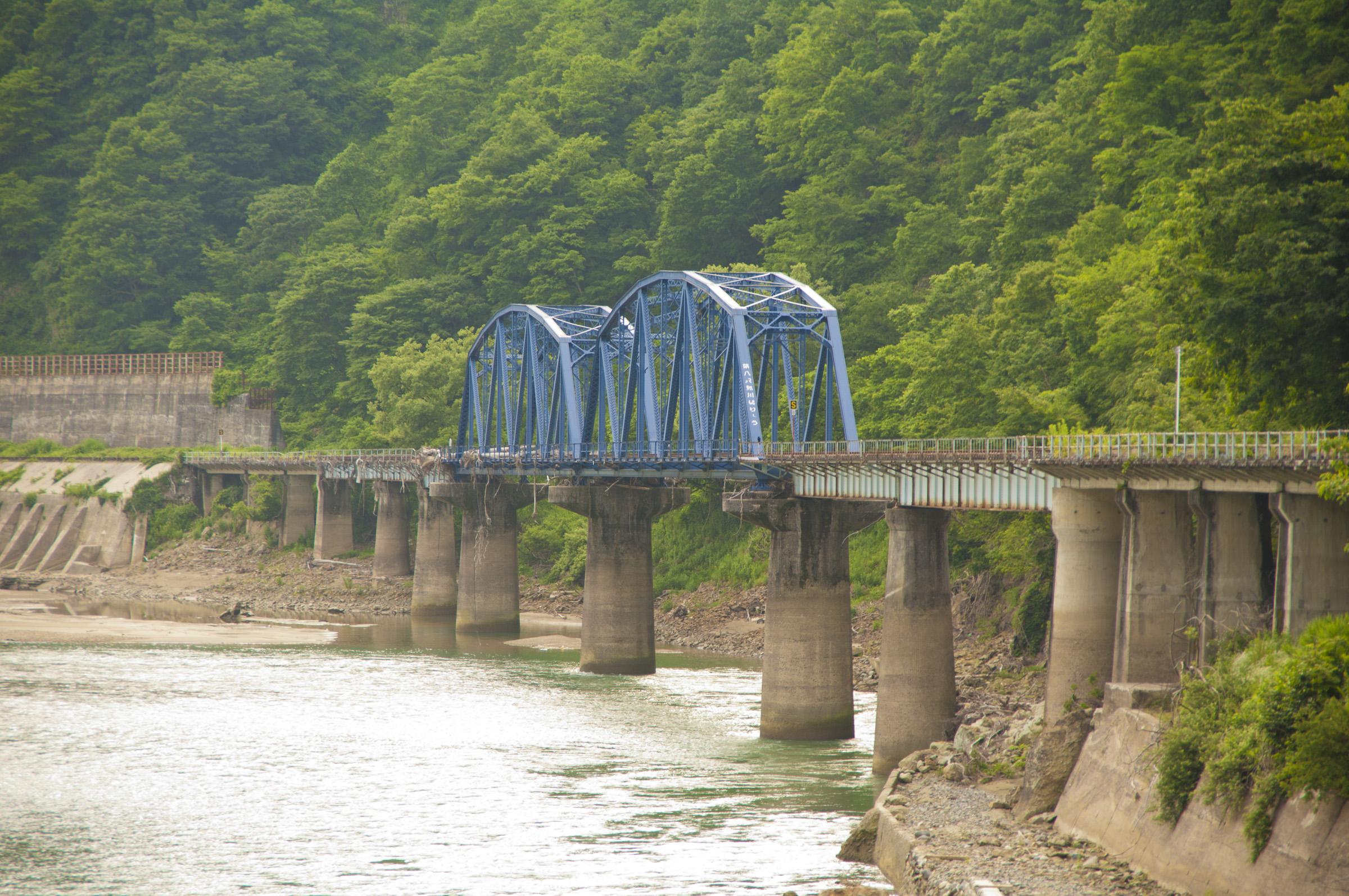 JR只見線第八只見川橋梁